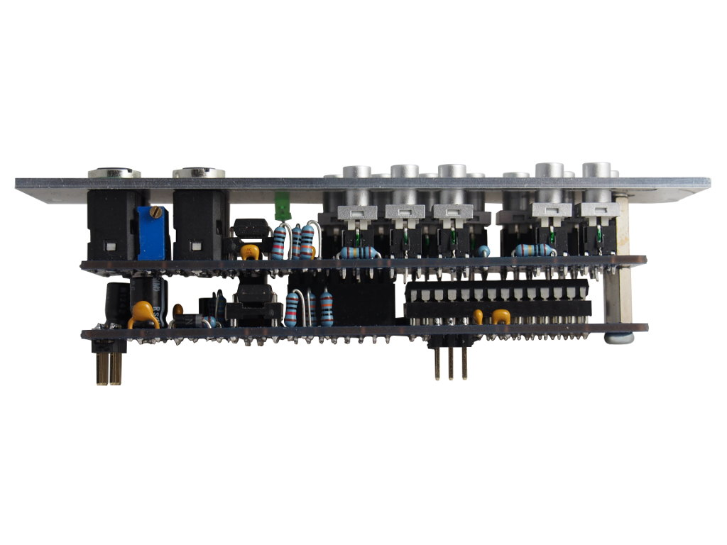 Penrose DIY eurorack quantizer